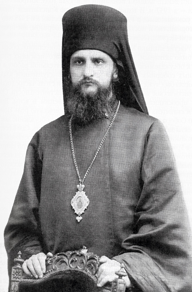 Андрей (князь А.А.Ухтомский)